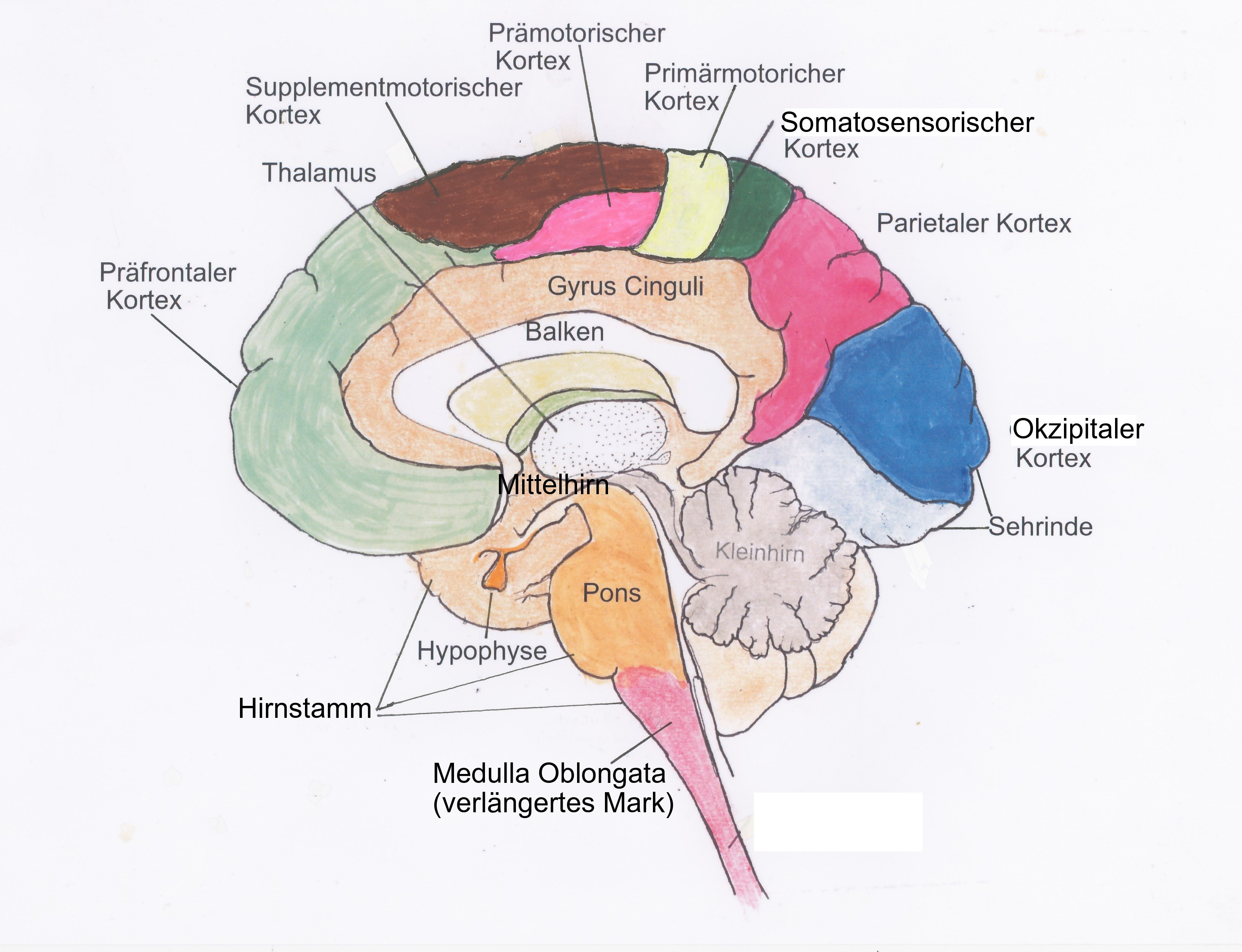 Darstellung der rechten Großhirnhemisphäre nach einem Längsschnitt, mit Markierung ihrer Funktionsbereiche